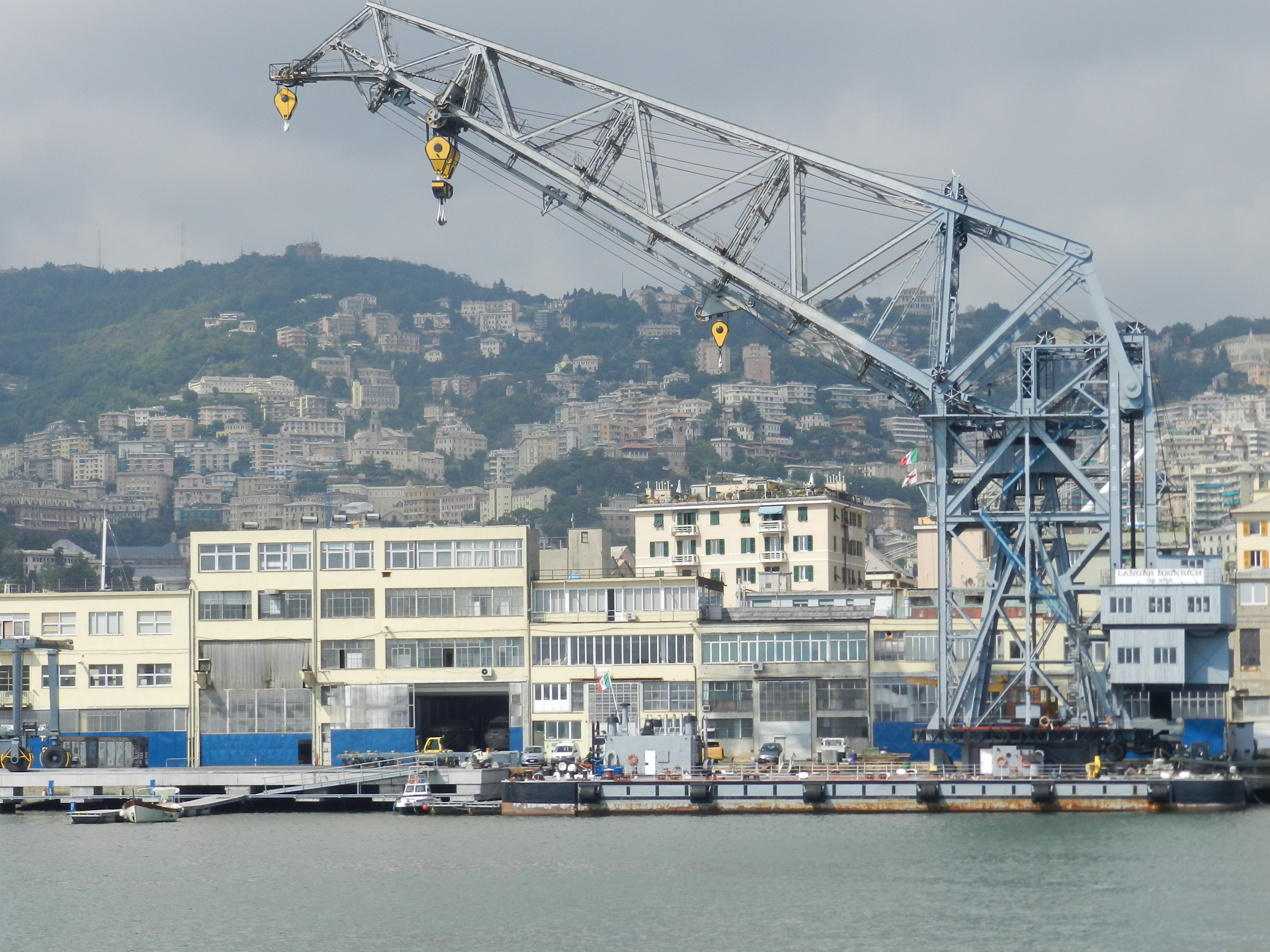 Fotografie des Schimmkrans Langer Heinrich im Hafen Genua